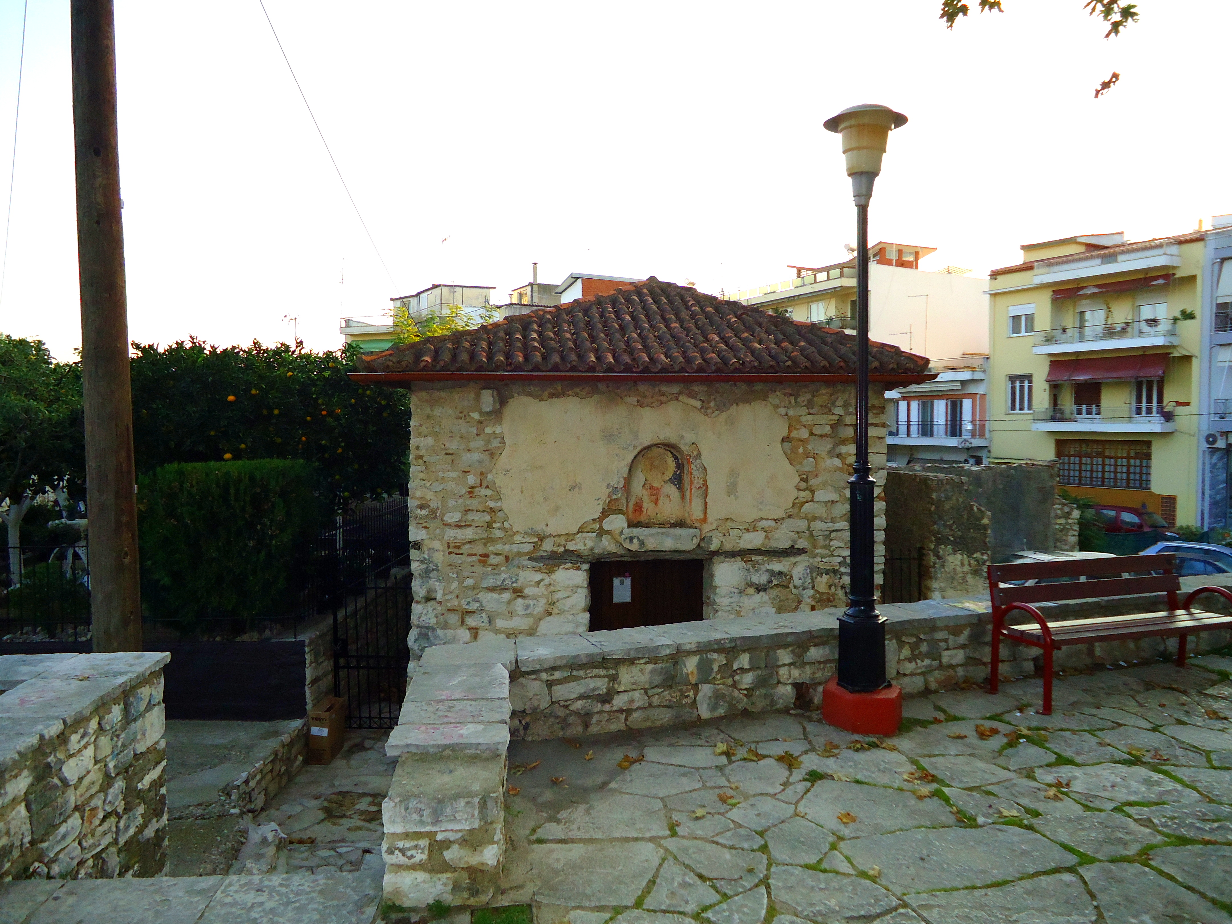 Το ιερό Παρεκκλήσιο της Μεταμορφώσεως του Σωτήρος αποτελούσε μέρος της Ιεράς Μονής του Αγίου Γεωργίου - Αγ. Θεοδώρας, μέσα στον αύλειο χώρο της, λίγα μέτρα βορειοανατολικά του καθολικού. Ο σημερινός ναός είναι μια μικρή ξυλόστεγη βασιλική κτισμένη πάνω στα θεμέλια παλαιότερου ναού. Ο δυτικός τοίχος του ναού είναι ο αρχικός και ανάγεται στον 13ο αι., εποχή της ανακαίνισης και επέκτασης της Μονής από την Αγία Θεοδώρα. Σώζεται επίσης σε μικρό ύψος η παλαιά τοιχοποιία του βόρειου και νότιου τοίχου. Το σημερινό οικοδόμημα κτίστηκε σύμφωνα με την κτιτορική επιγραφή που βρίσκεται πάνω απ’ τη δυτική είσοδο του ναού, στα τέλη του 16ου αι. ή στις αρχές του 17ου αι. και τοιχογραφήθηκε το 1623, κατά την αρχιερατεία του Μητροπολίτου Ναυπάκτου και Άρτης Γαβριήλ Ε’ (1602-1624).